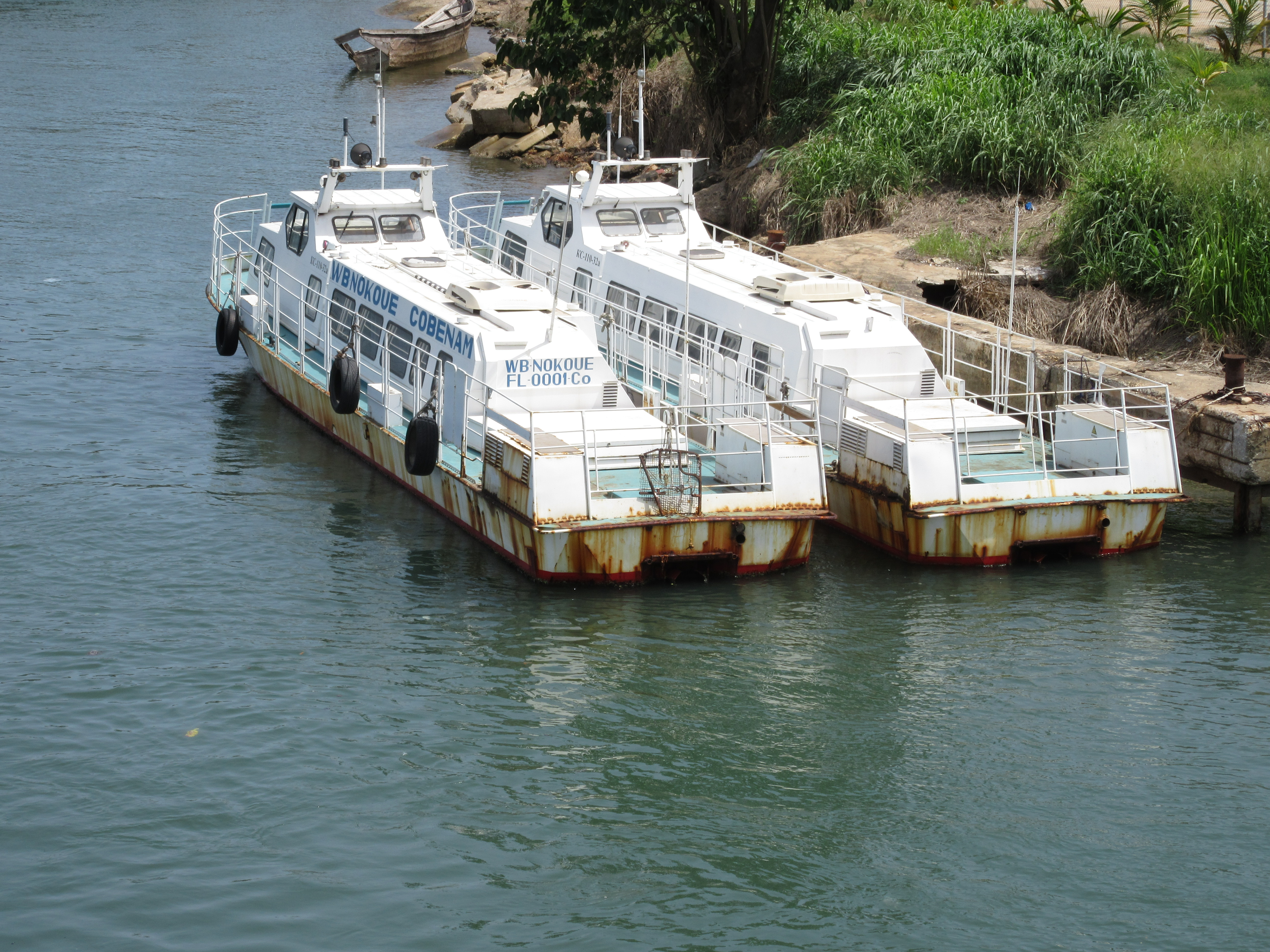 l'ancient pont à Cotonou This is an image with the theme "Africa on the Move or Transport" from: Benin